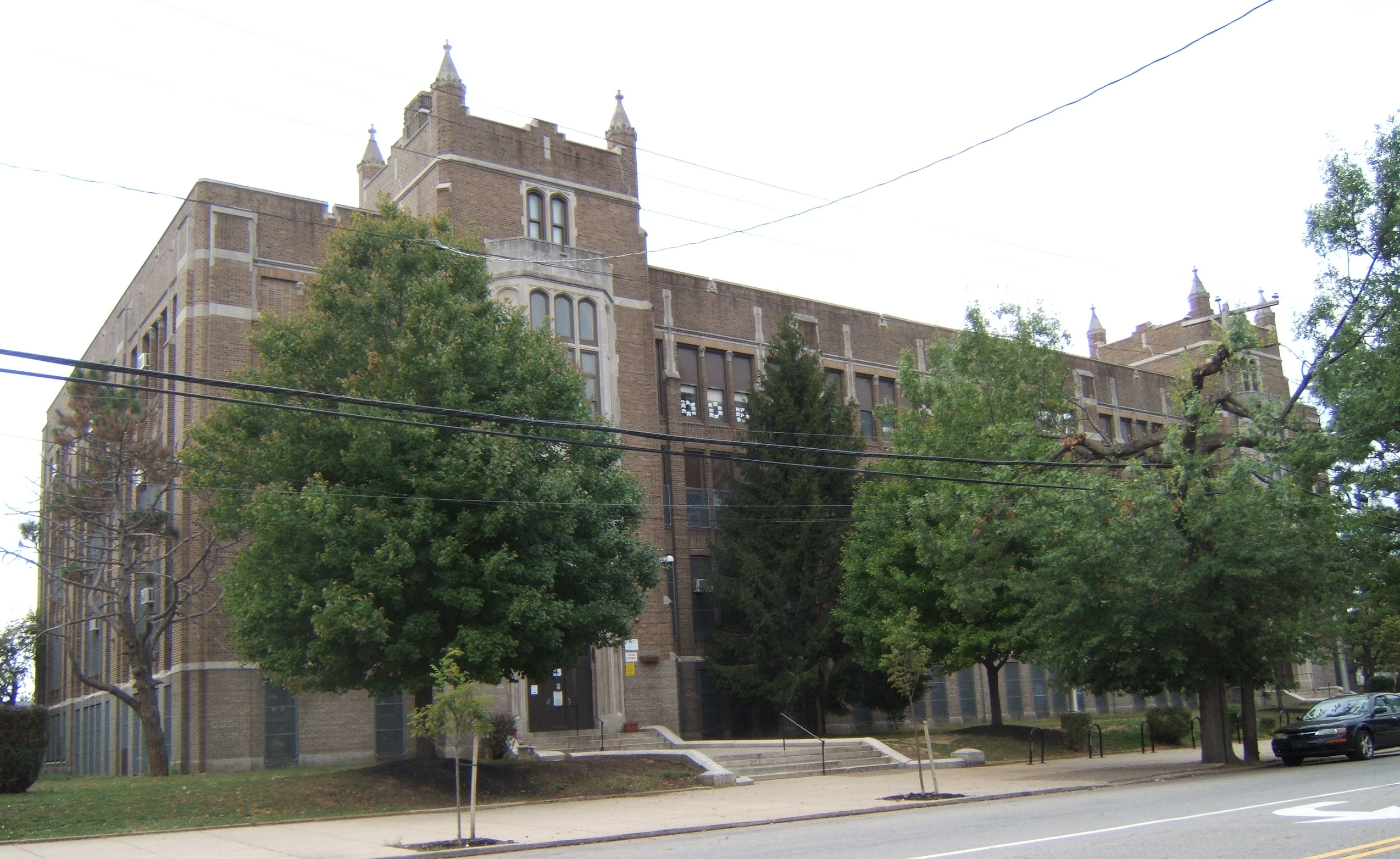 Laura H. Carnell School, 1100 Devereaux Avenue, Philadelphia, PA 19111